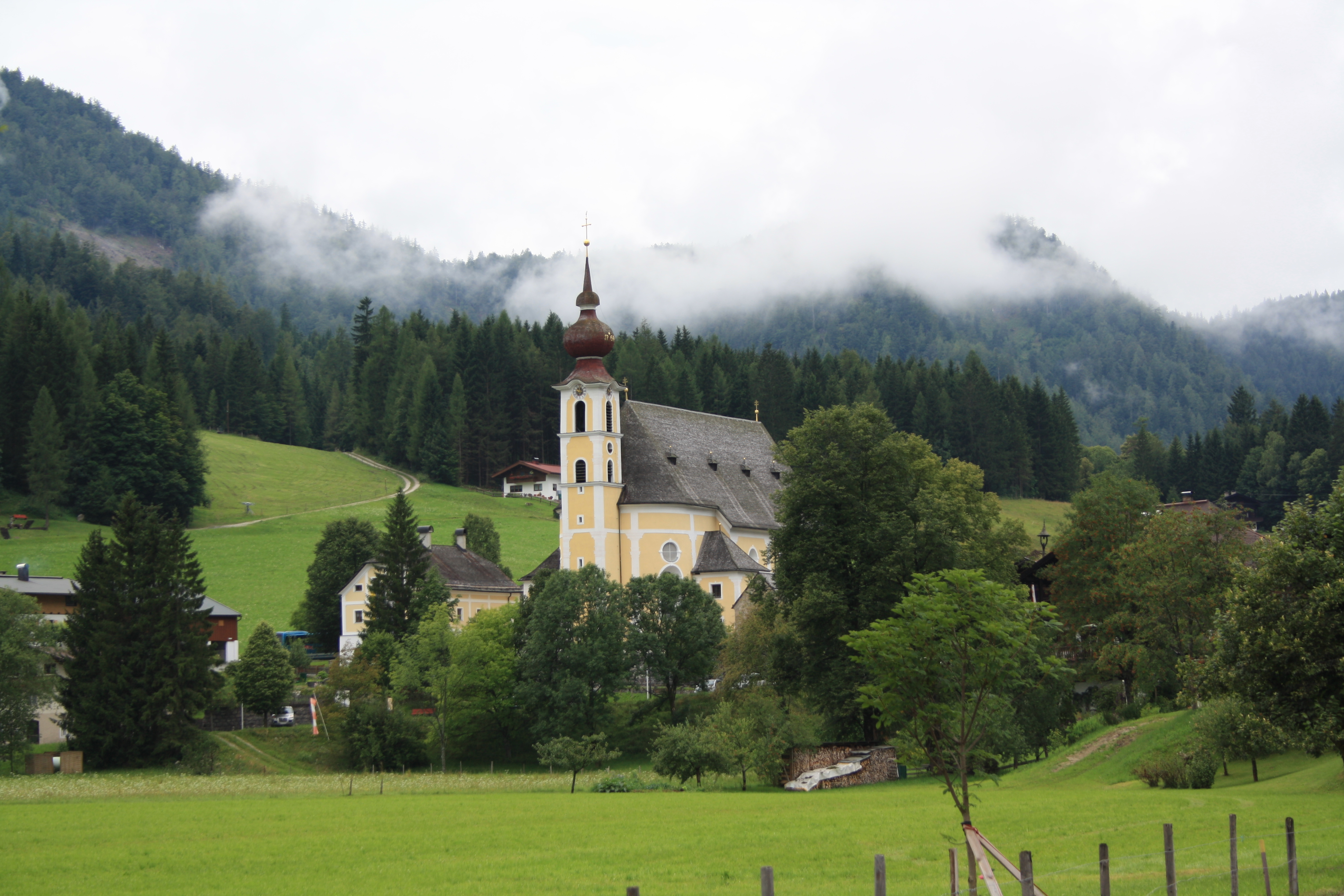 Blick auf die Kirche von Waidring